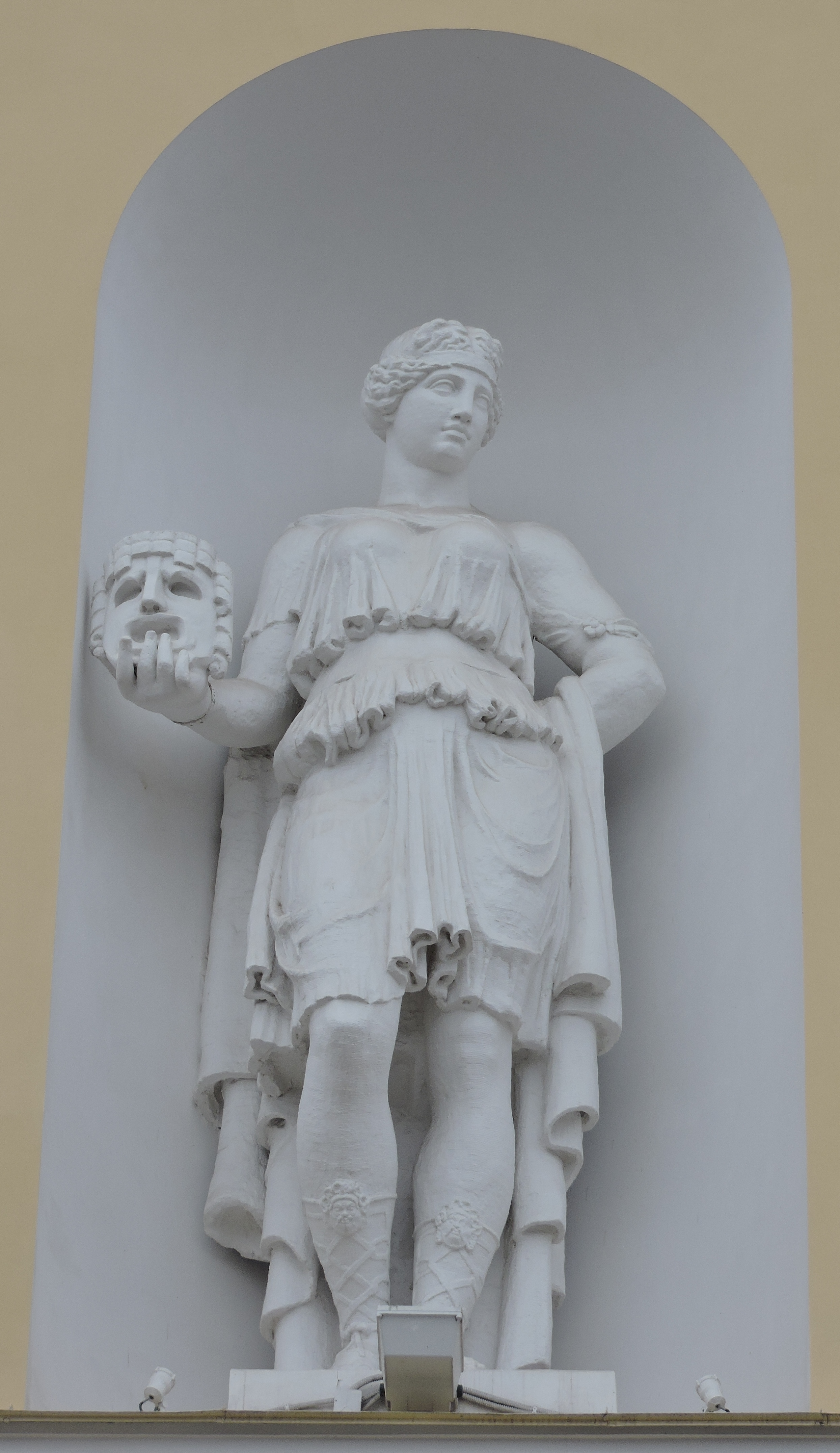 Муза с маской (Александринка)